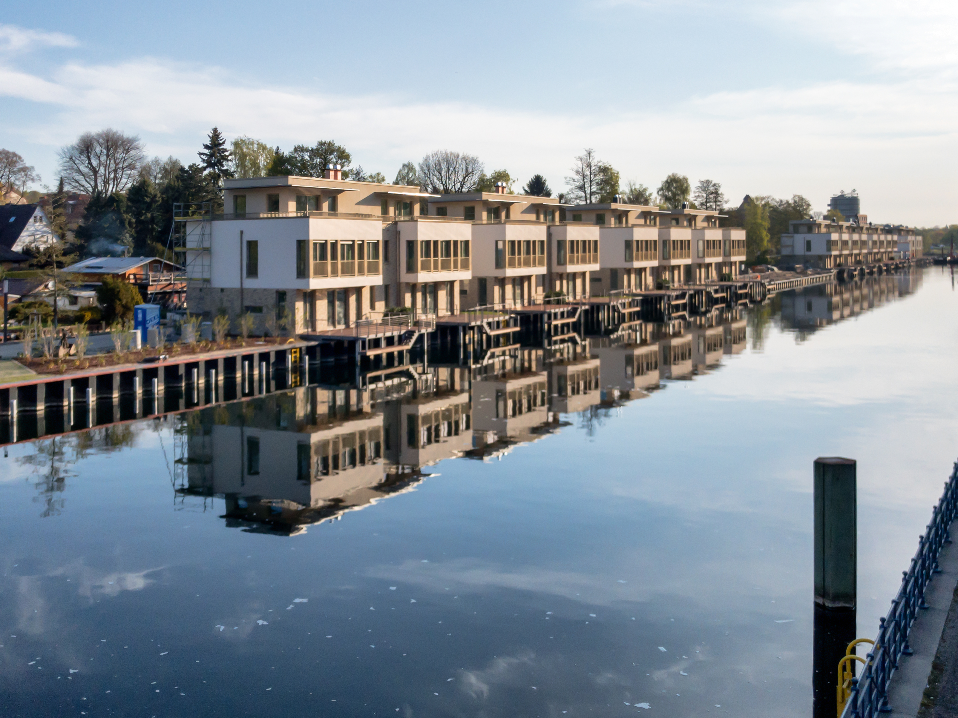 Blick von der Sechserbrücke auf die Humboldtinsel, 2017